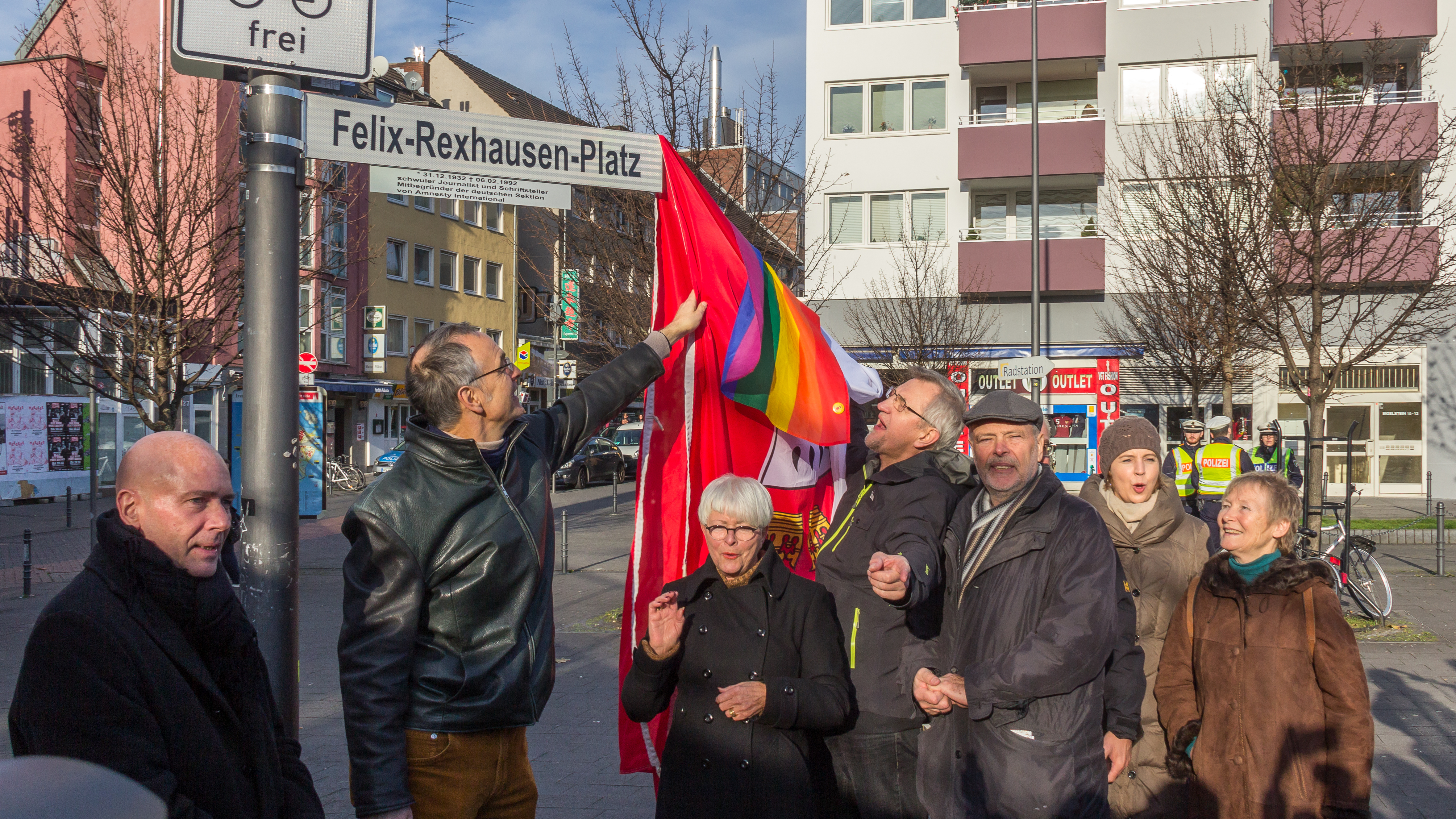 Einweihung des Felix-Rexhausen-Platzes, Köln Foto: Enthüllung des Straßenschildes